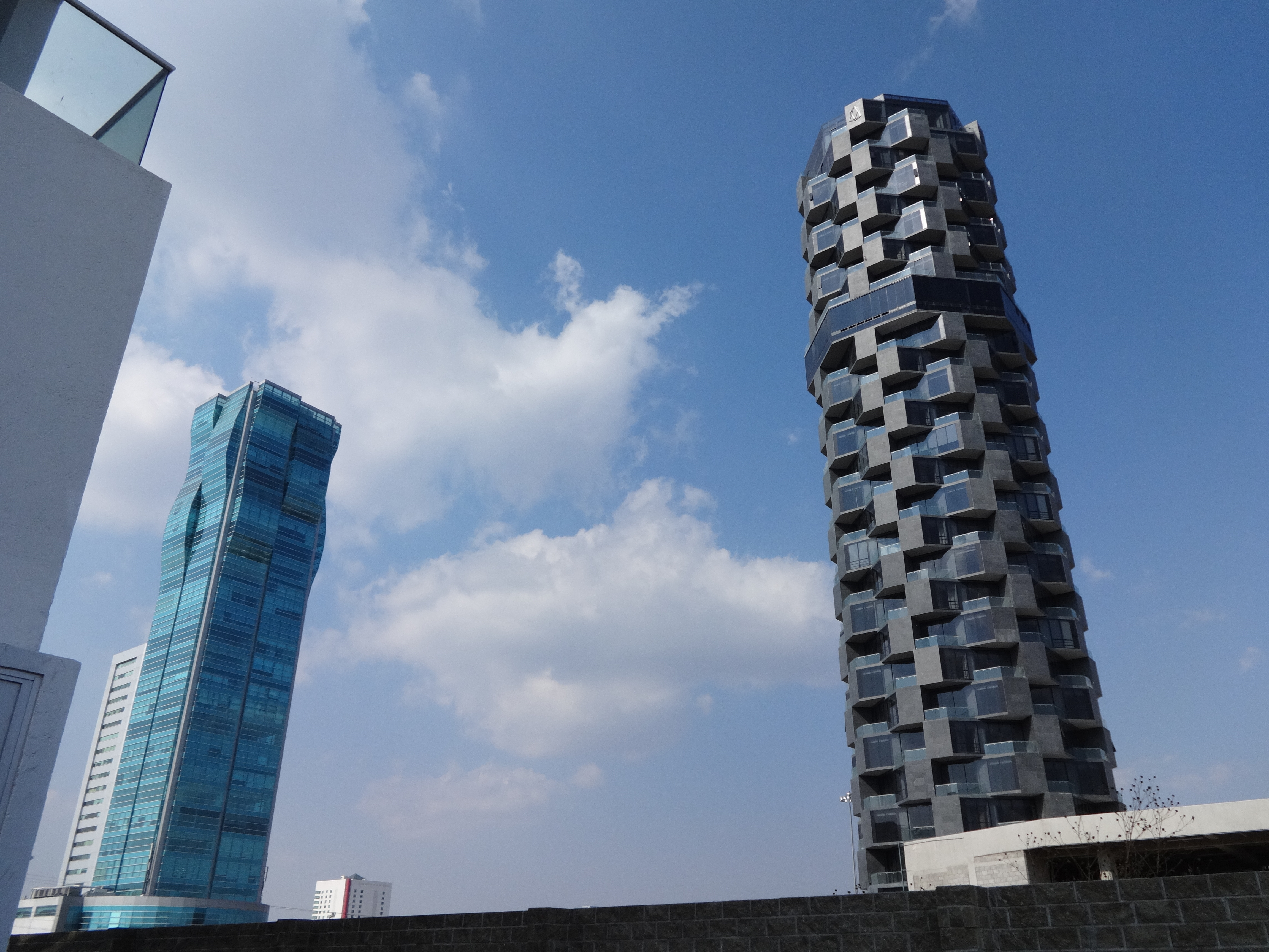 Torre Ejecutiva JV III (izq) & Torre Adamant (der)